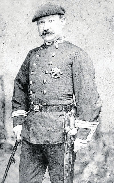 Ramon Nolla amb uniforme carlí